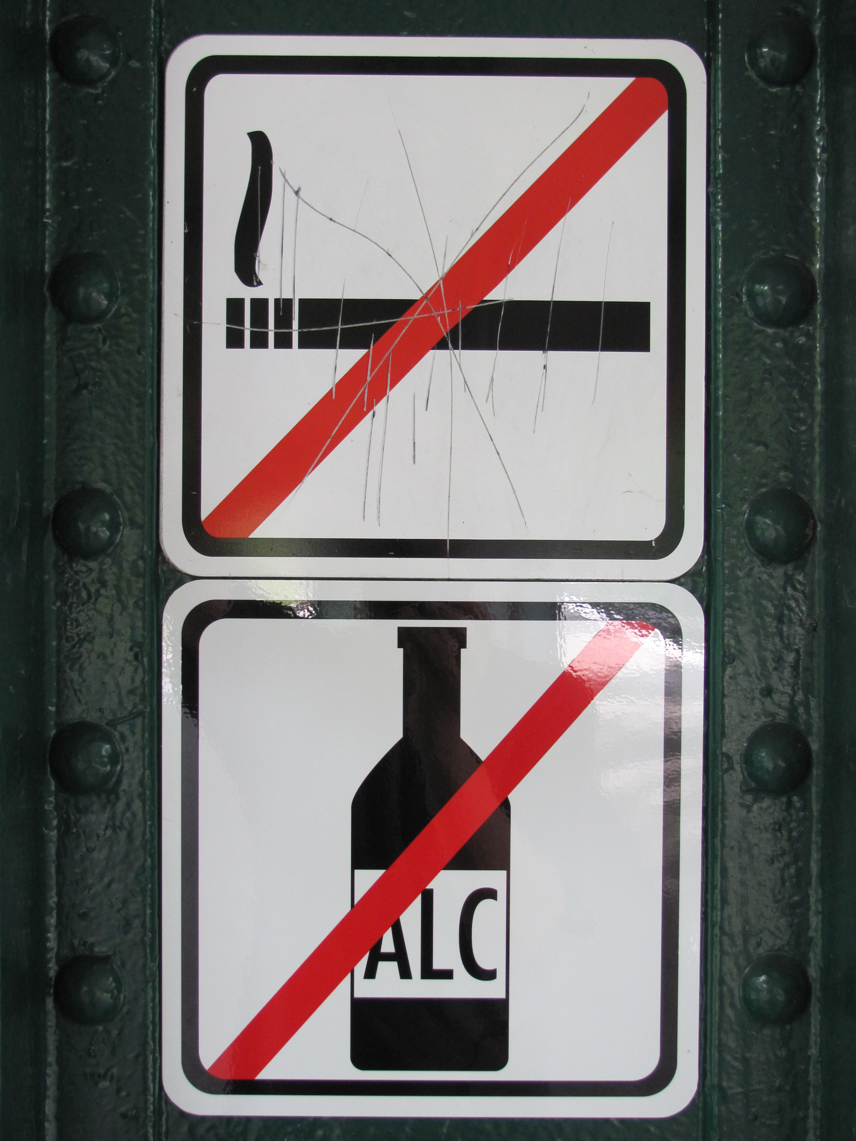 Rauch- und Alkoholsverbotsschilder im Hamburger Verkehrsverbund